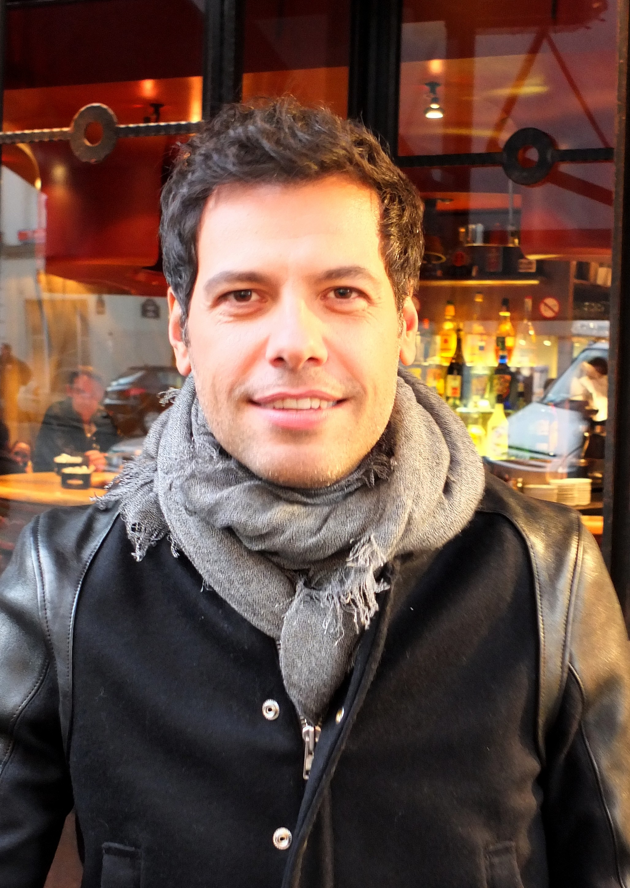 Laurent Lafitte sur le tournage de Elle aime, elle adore de Jeanne Herry, à Paris le 16 octobre 2013